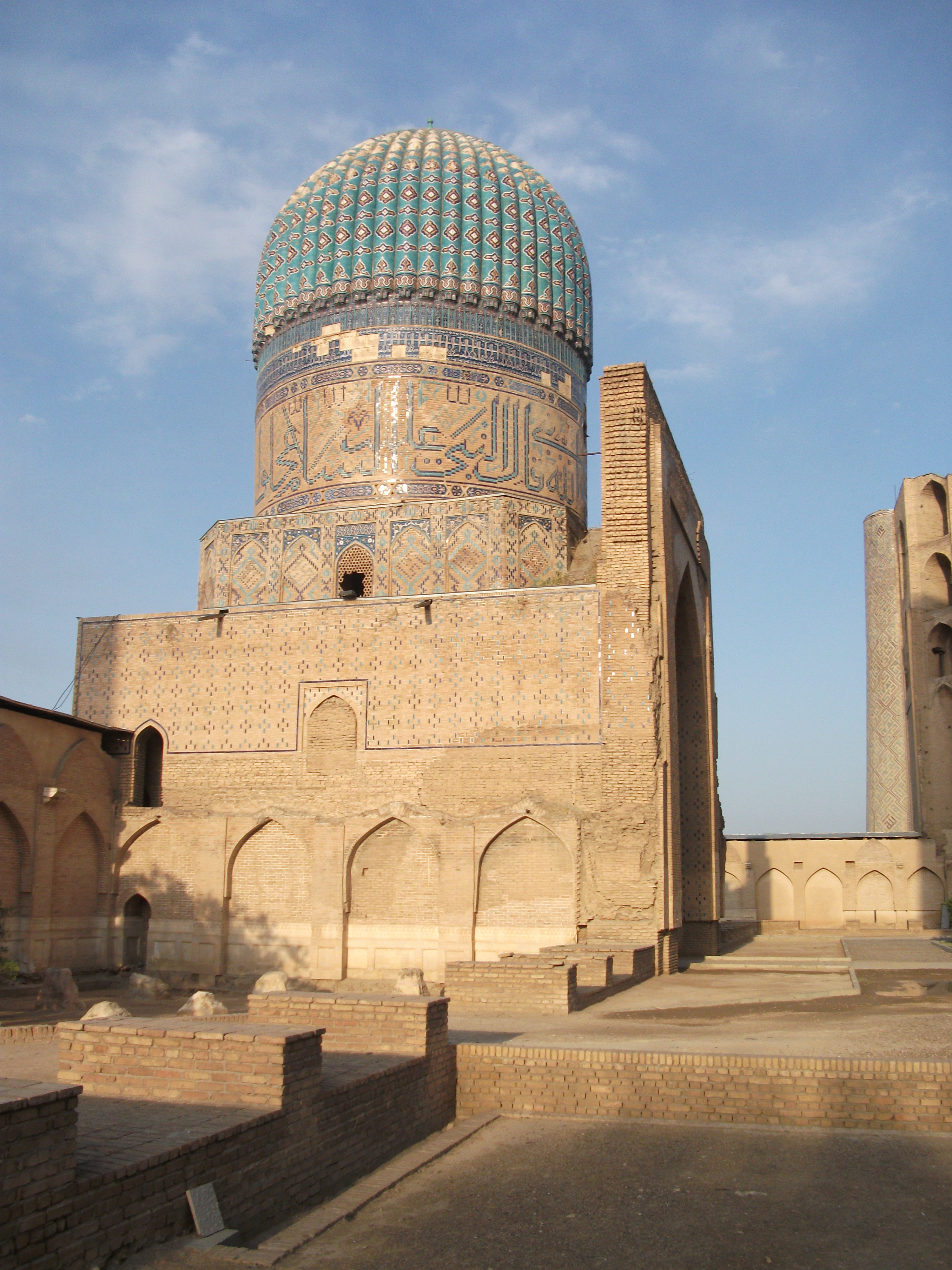 Мечеть Биби-ханым